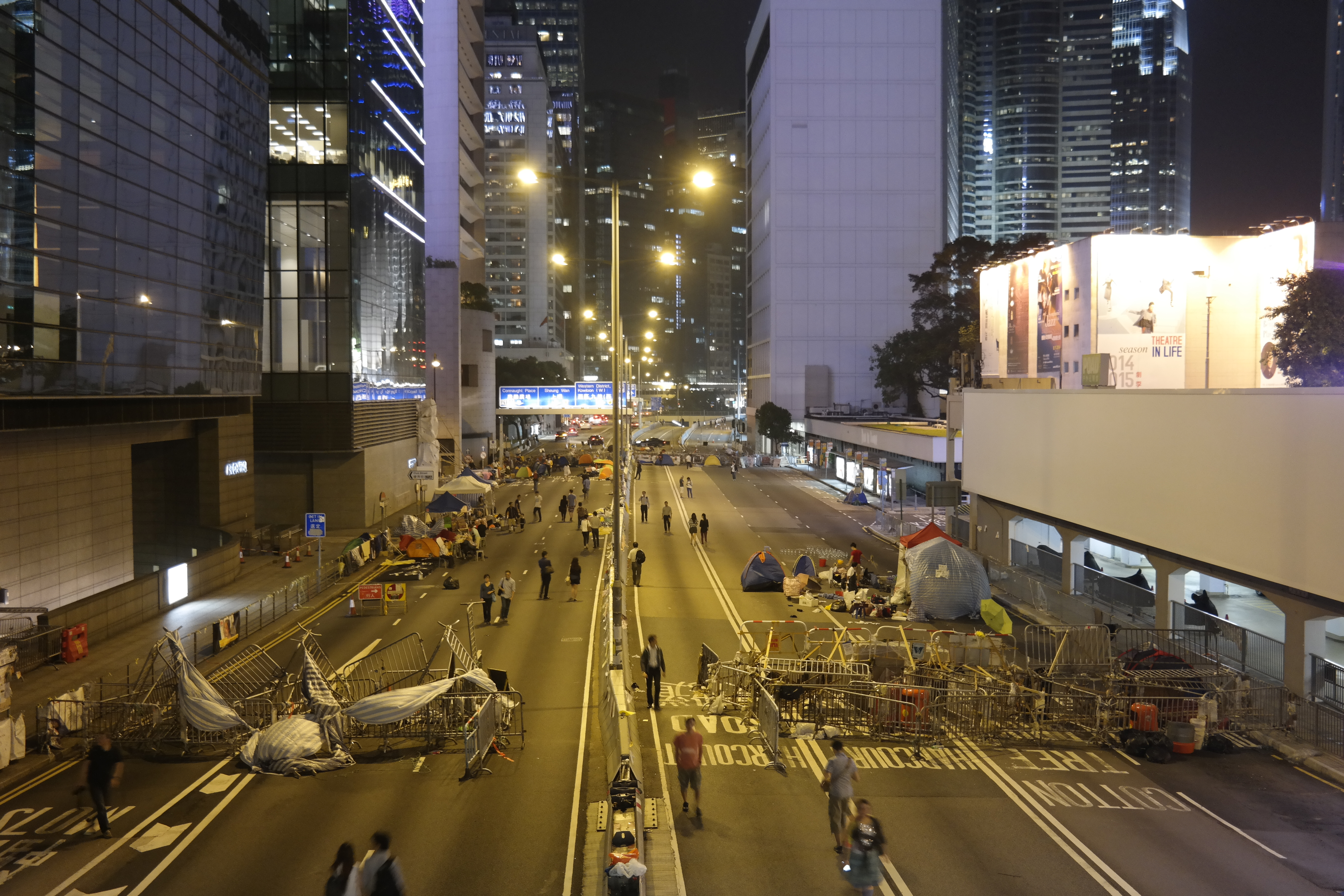 中文（香港）: 金鐘路障——10月23號